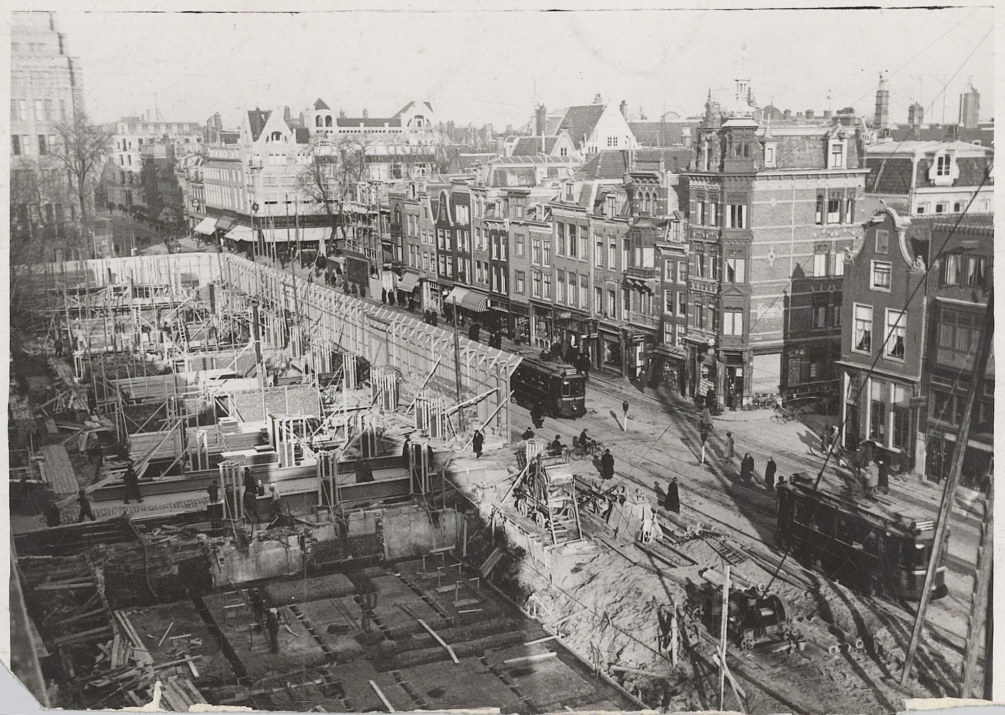 Beschrijving Bouwput voor een woon-winkelcomplex Amstelstein naar ontwerp van J.M. van der Mey langs de Vijzelstraat Tussen de Keizersgracht en de Prinsengracht. In 1962 afgebroken na twee instortingen Documenttype foto Vervaardiger Onbekend Anoniem Collectie Collectie Stadsarchief Amsterdam: foto-afdrukken Datering 1925 ca. Geografische naam Vijzelstraat Inventarissen Afbeeldingsbestand ANWC00253000001